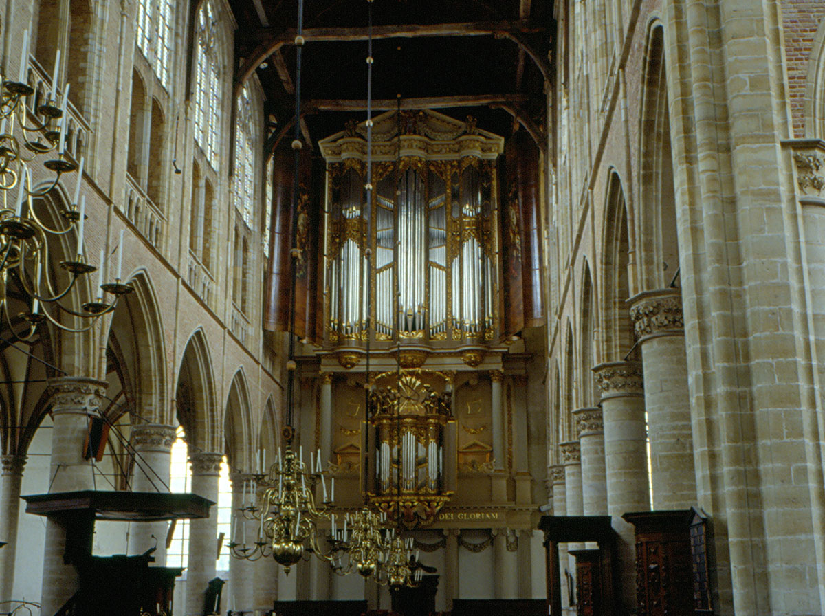 St. Laurenskerk di Alkmaar, Olanda